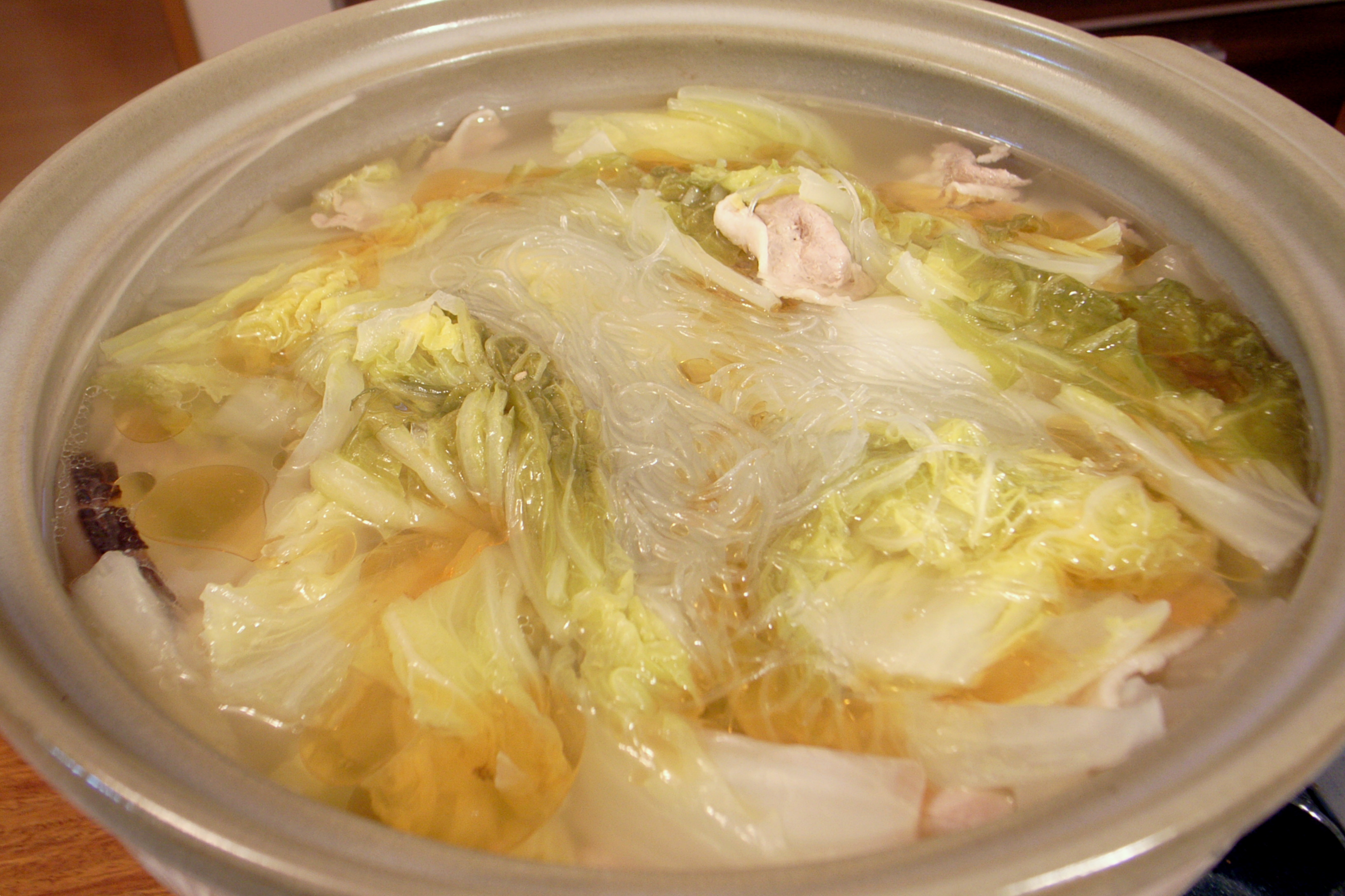 扁炉